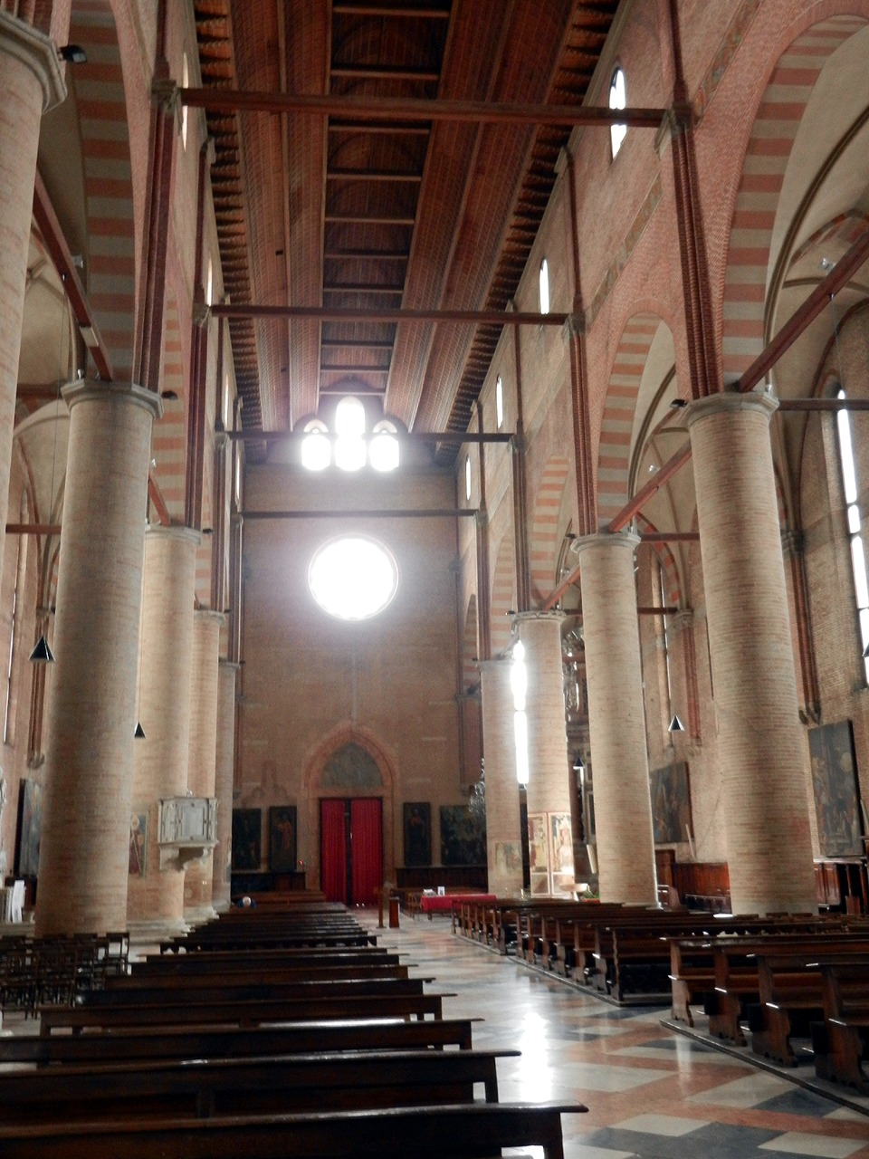 Treviso - Interno della Chiesa di S. Nicolò